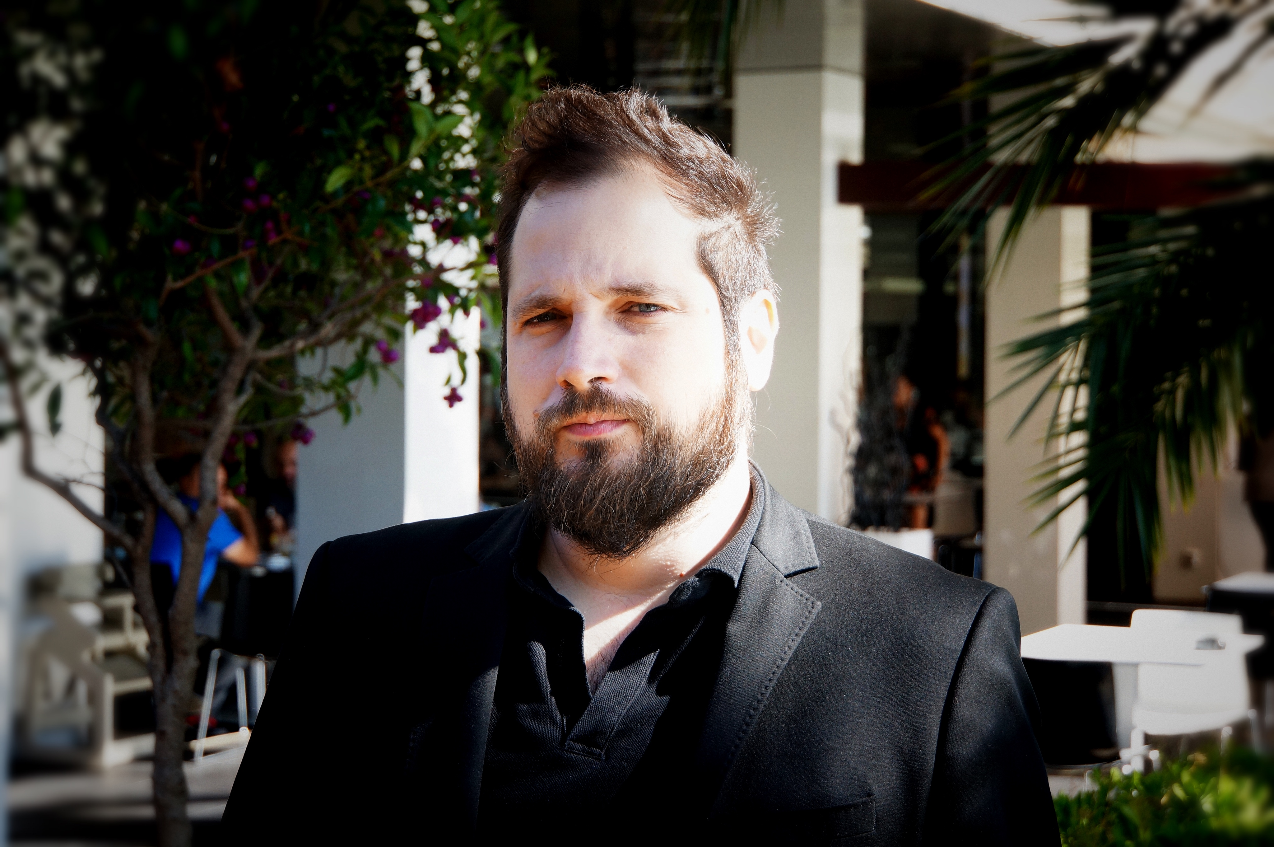 Carlos Vermut en el estreno de Magical Girl en el festival de Cine de Sitges 2014